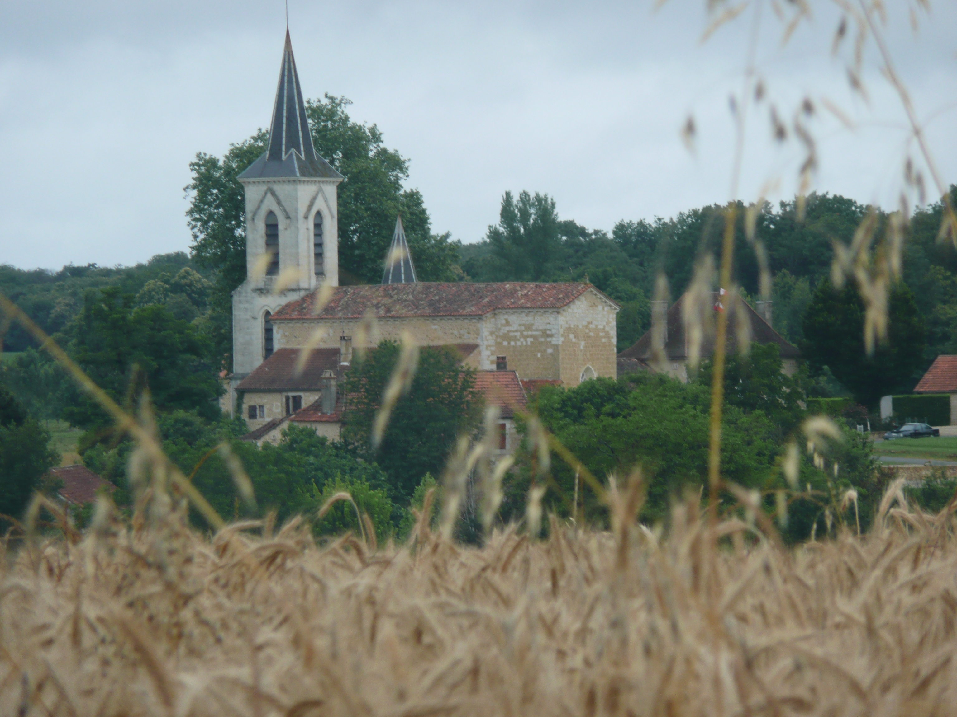 L'église de Fouleix et son clocher.